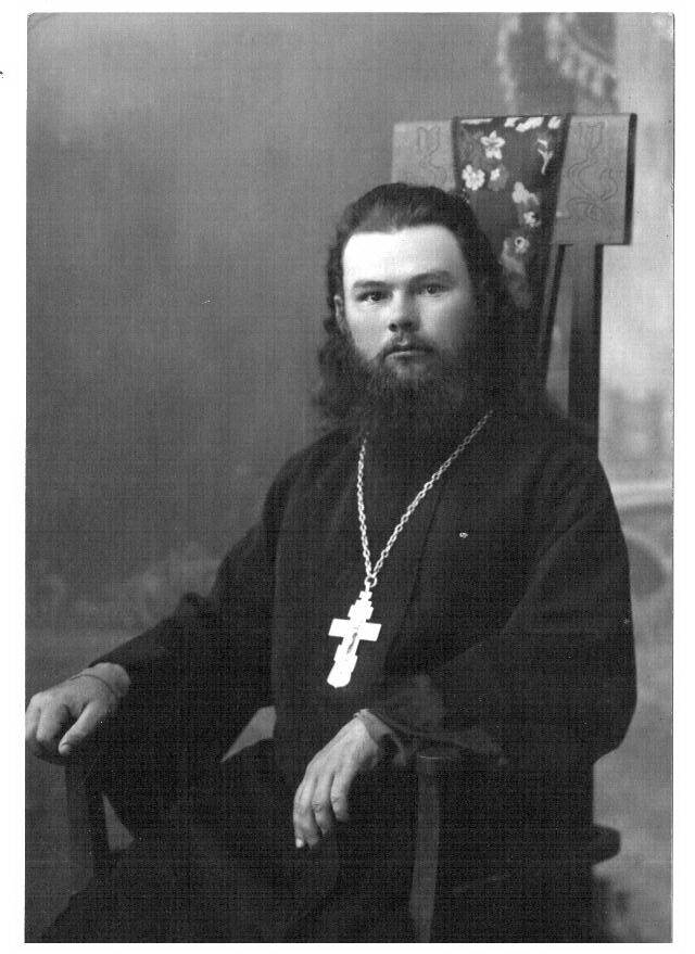 Вместе с семьей отступал с армией Колчака, умер незадолго после его казни в Омске. Место захоронения выяснить не удалось.